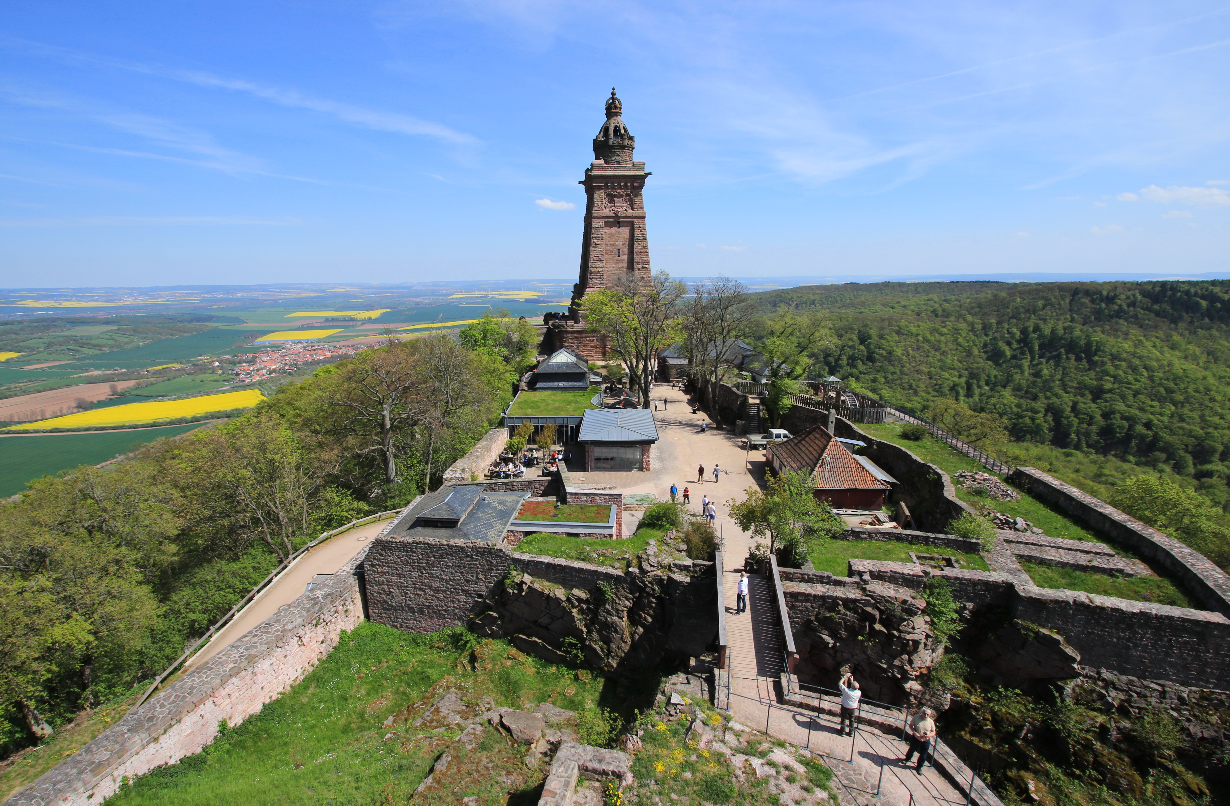 Kyffhäuser-Denkmal in Thüringen.